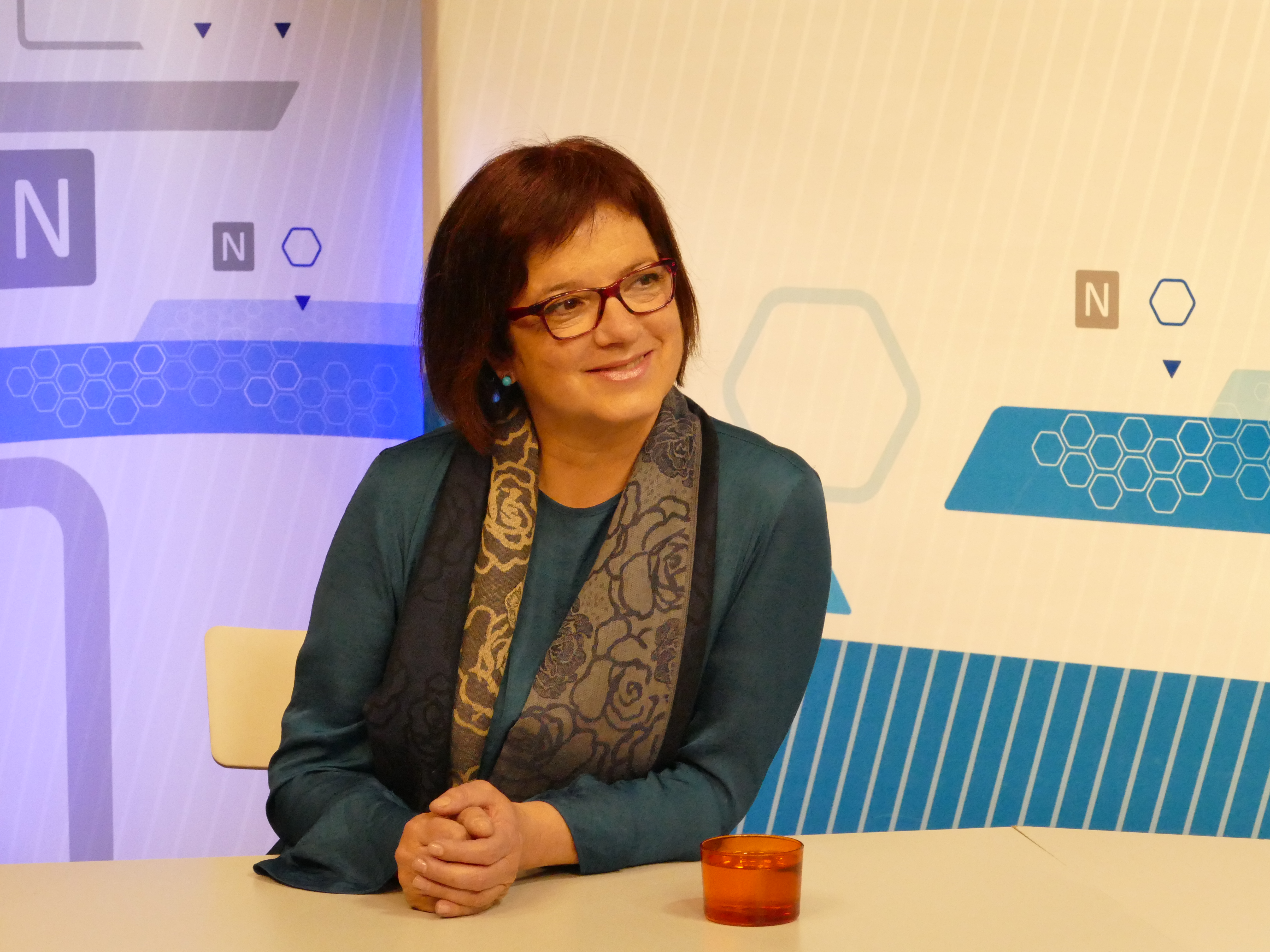 Escriptora Blanca Busquets